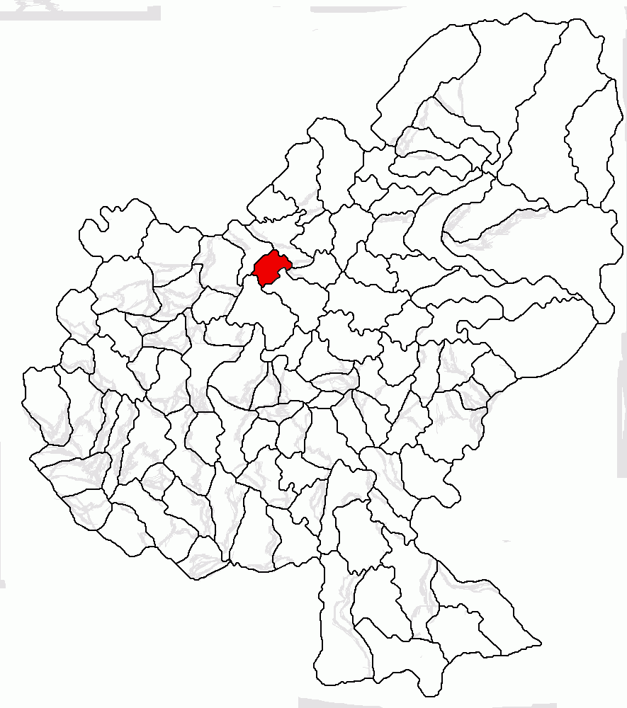 Categorie:Hărţi ale judeţului Mureş